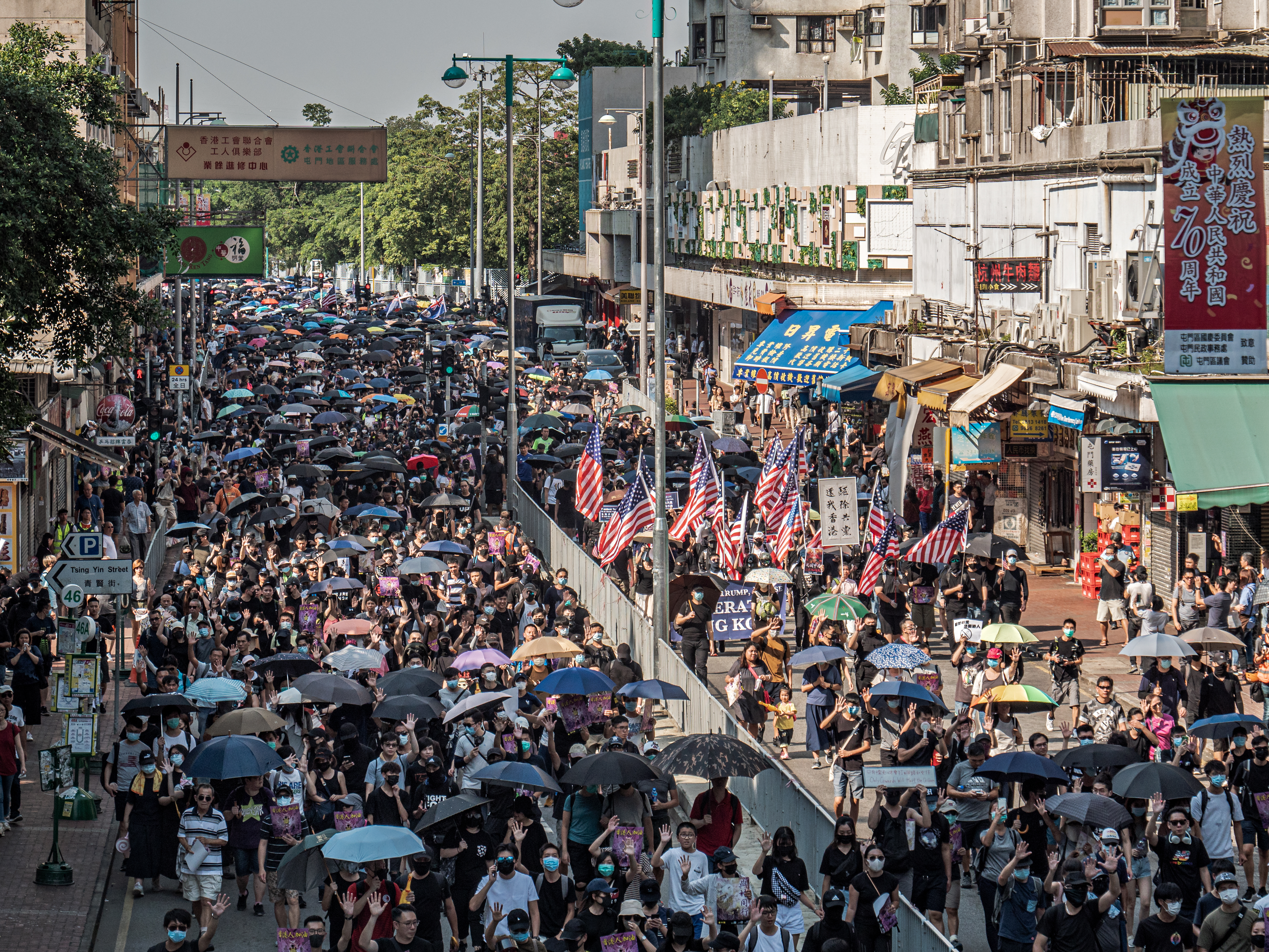 2019-09-22 Tuen Mun 光復屯門公園遊行